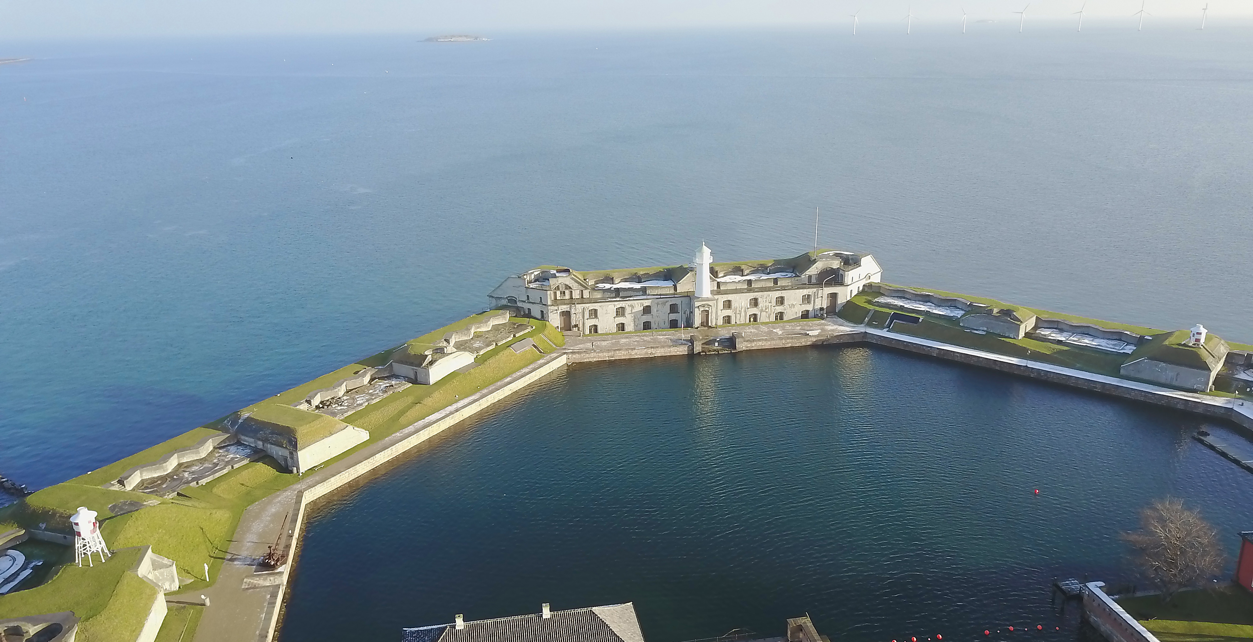 Drone foto fra freesky.dk